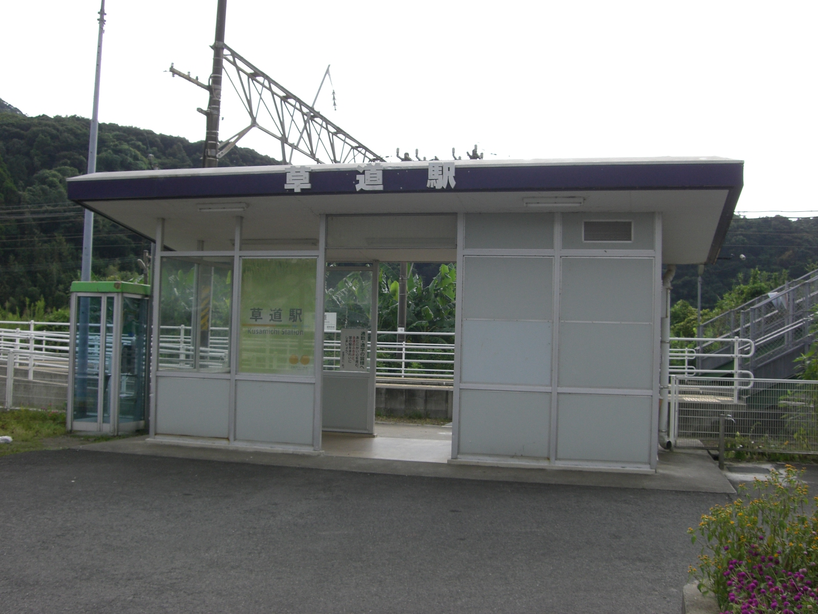 草道駅